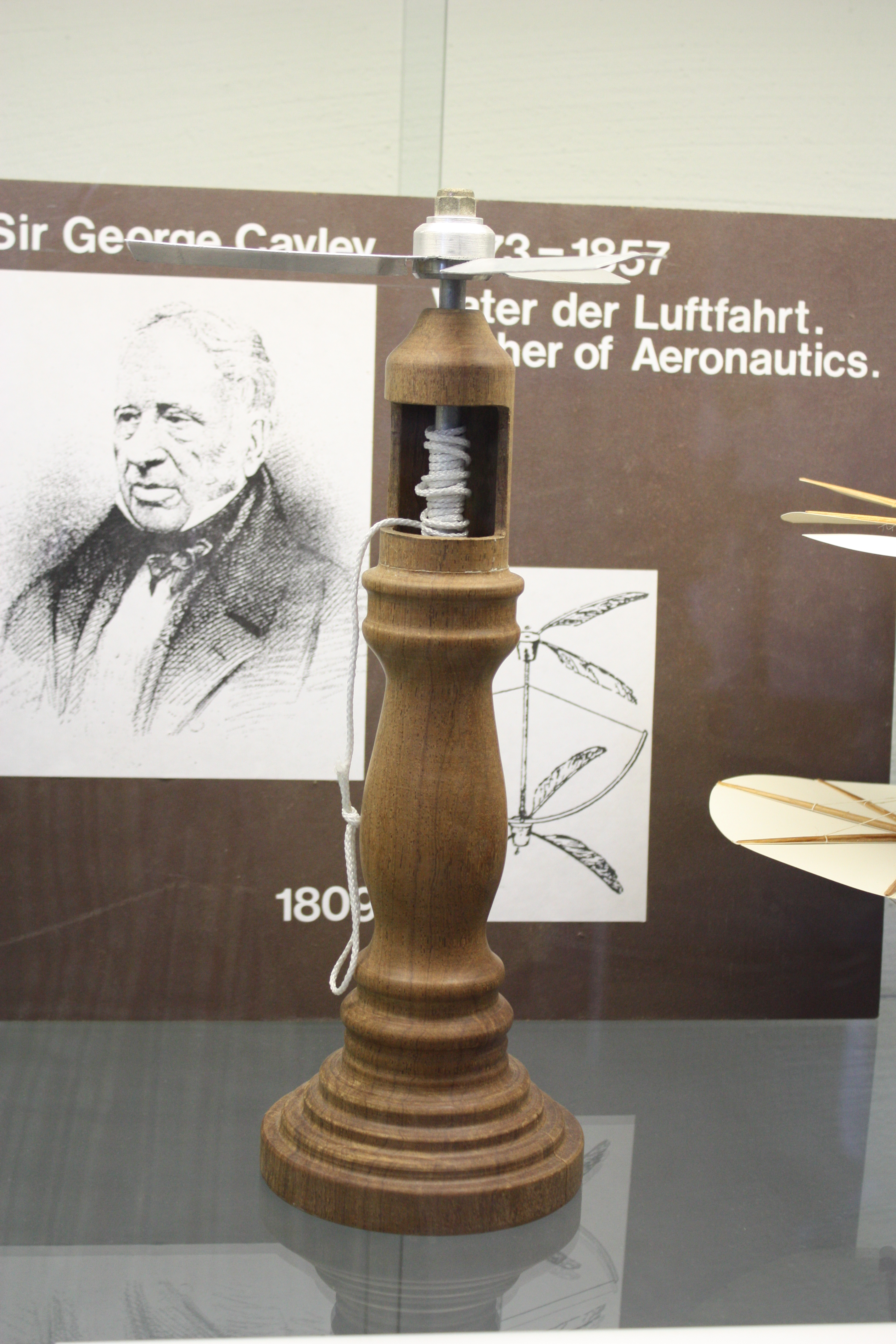 Hubschraubermuseum Bückeburg; Sir George Cayley; England; "Hubschrauber-Spielzeug" von 1854; Sir George Cayley made this 'Aerial Top' in 1854, right at the end of his career. The blades are made of tinfoil, the stand of rosewood.